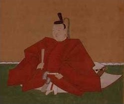 小堀政恒の肖像。